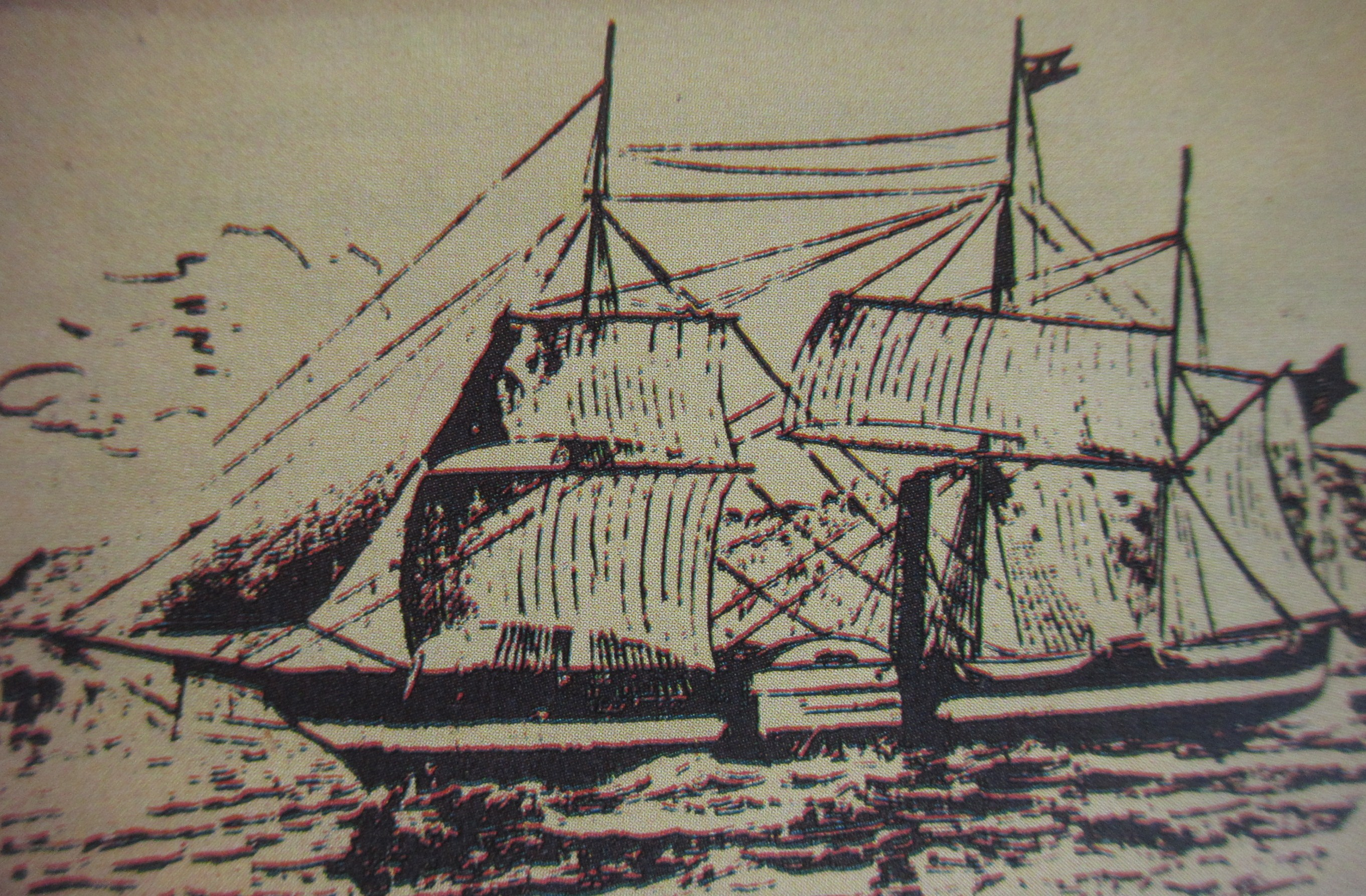 Goleta "Mississipi" comandada por el Comodoro Matheew C. Perry durante la "Primera Batalla de Tabasco" la cual fue ganada por el ejército tabasqueño comandado por el gobernador del estado el Coronel Juan Bautista Traconis Rodríguez. el 25 y 26 de octubre de 1846. Museo de Historia de Tabasco.